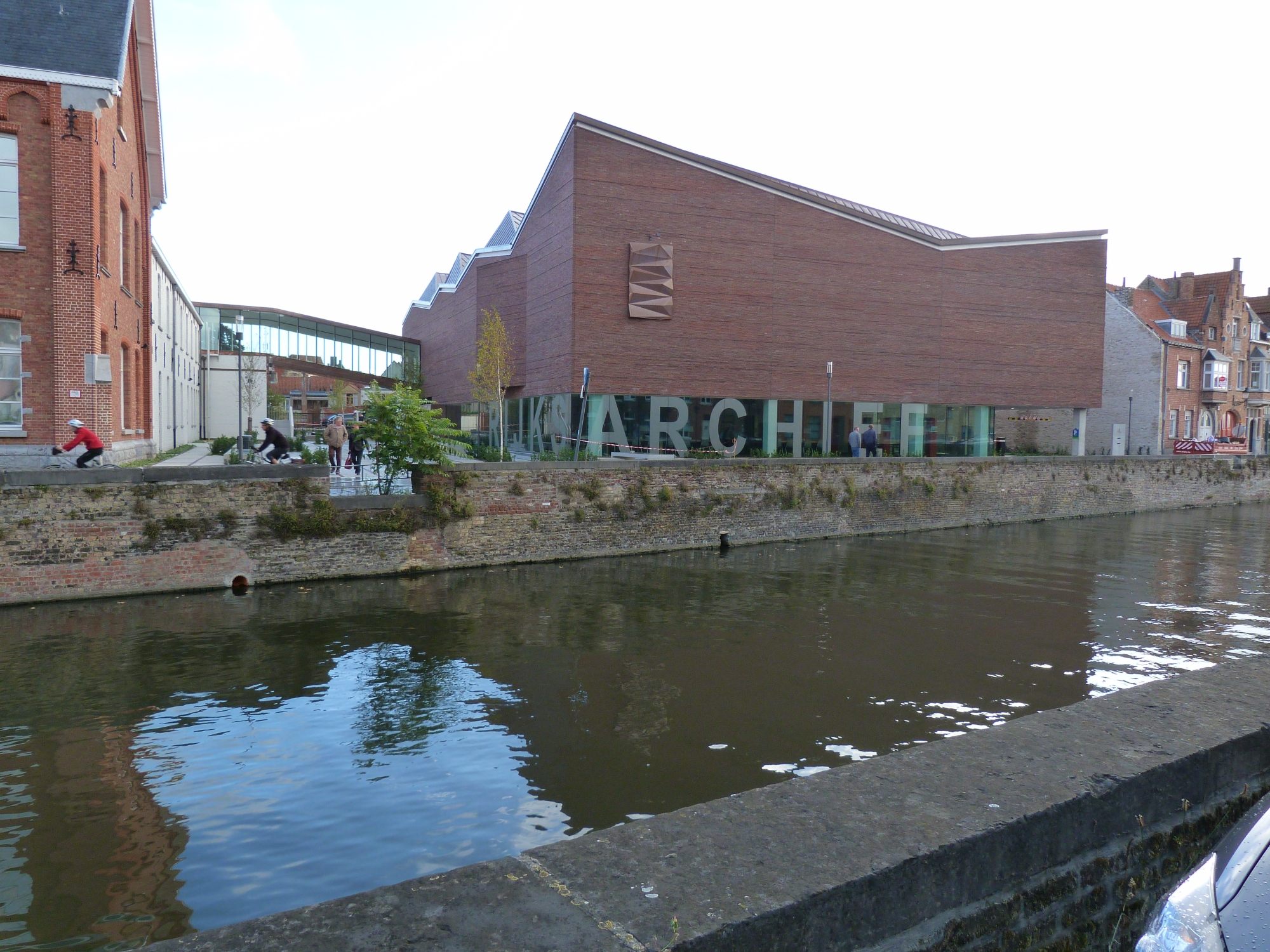 Nieuw Rijksarchief in Brugge in de Predikherenrei, gezien vanuit de straat Coupure.